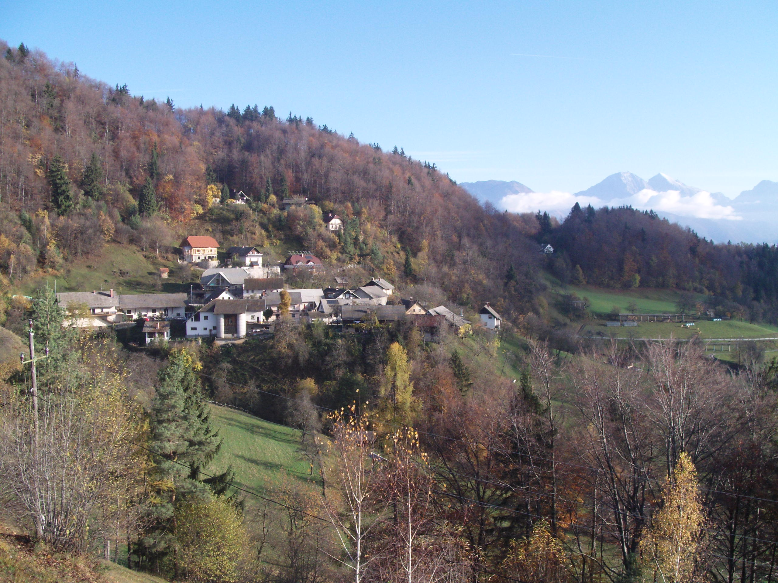 Pogled na Pševo.